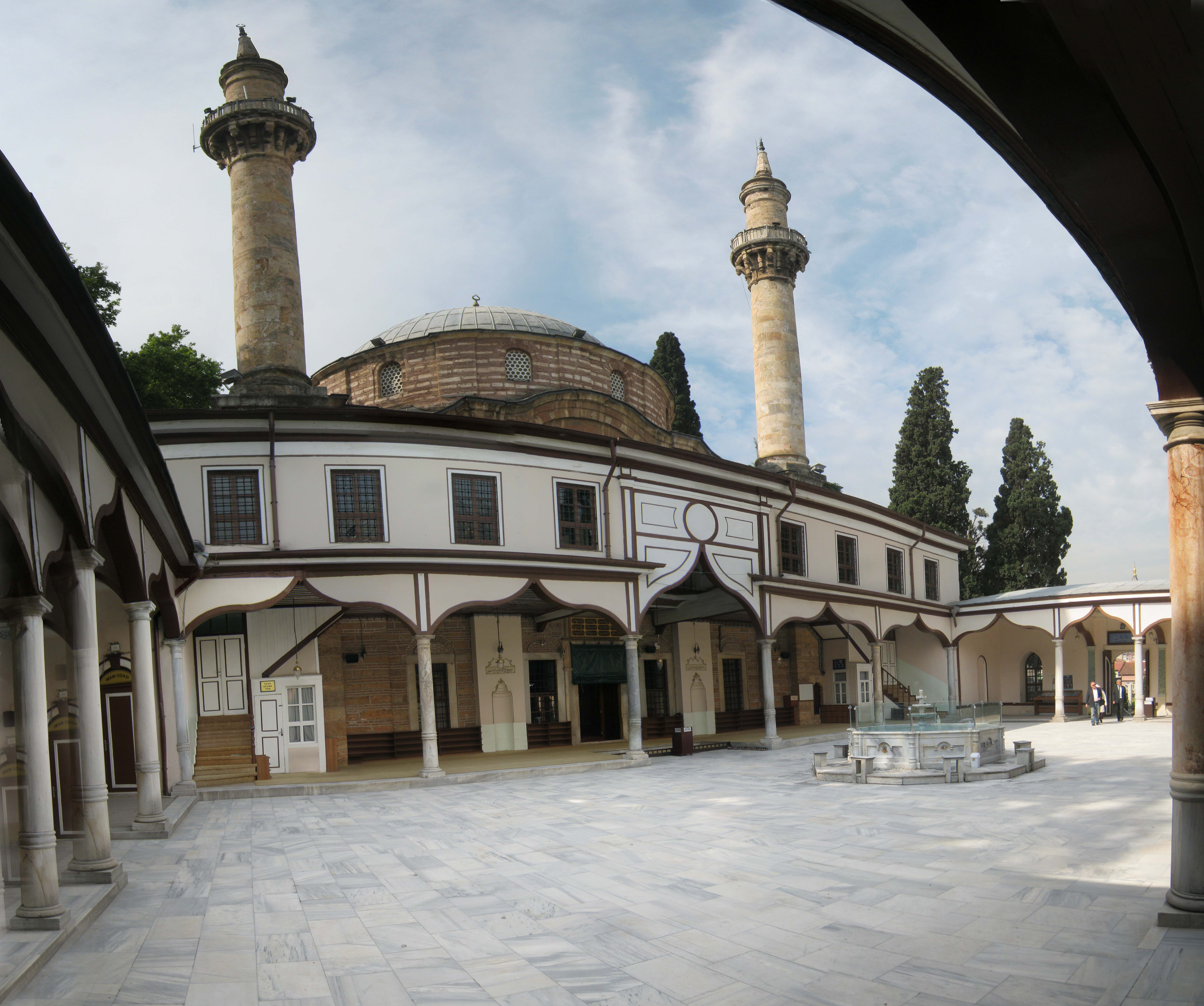 EMİRSULTAN CAMİ İÇ HAVLUSU BURSA